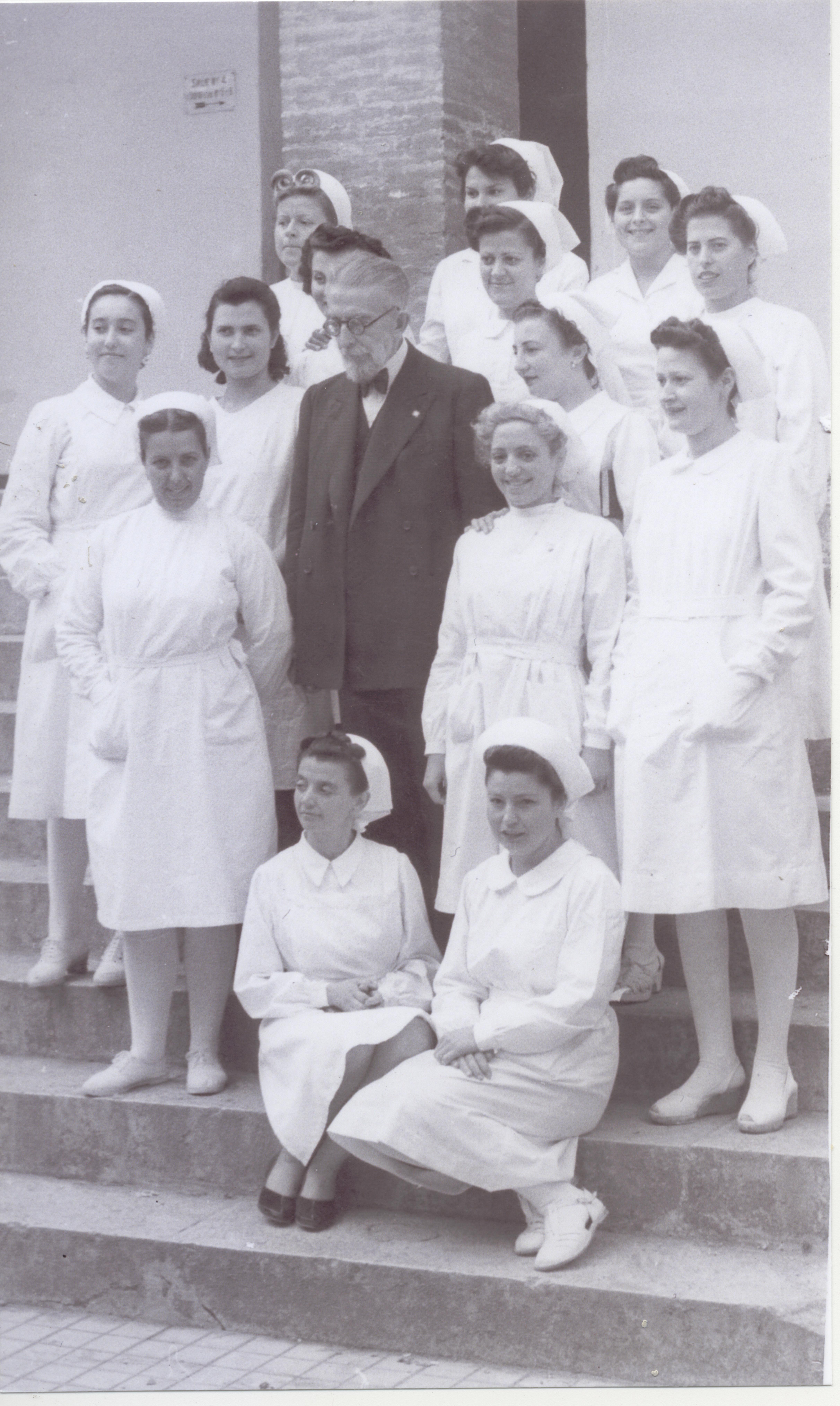 Dr. Gálvez Ginachero en el Hospital Civil de Málaga. Escuela de Matronas. Años 50.